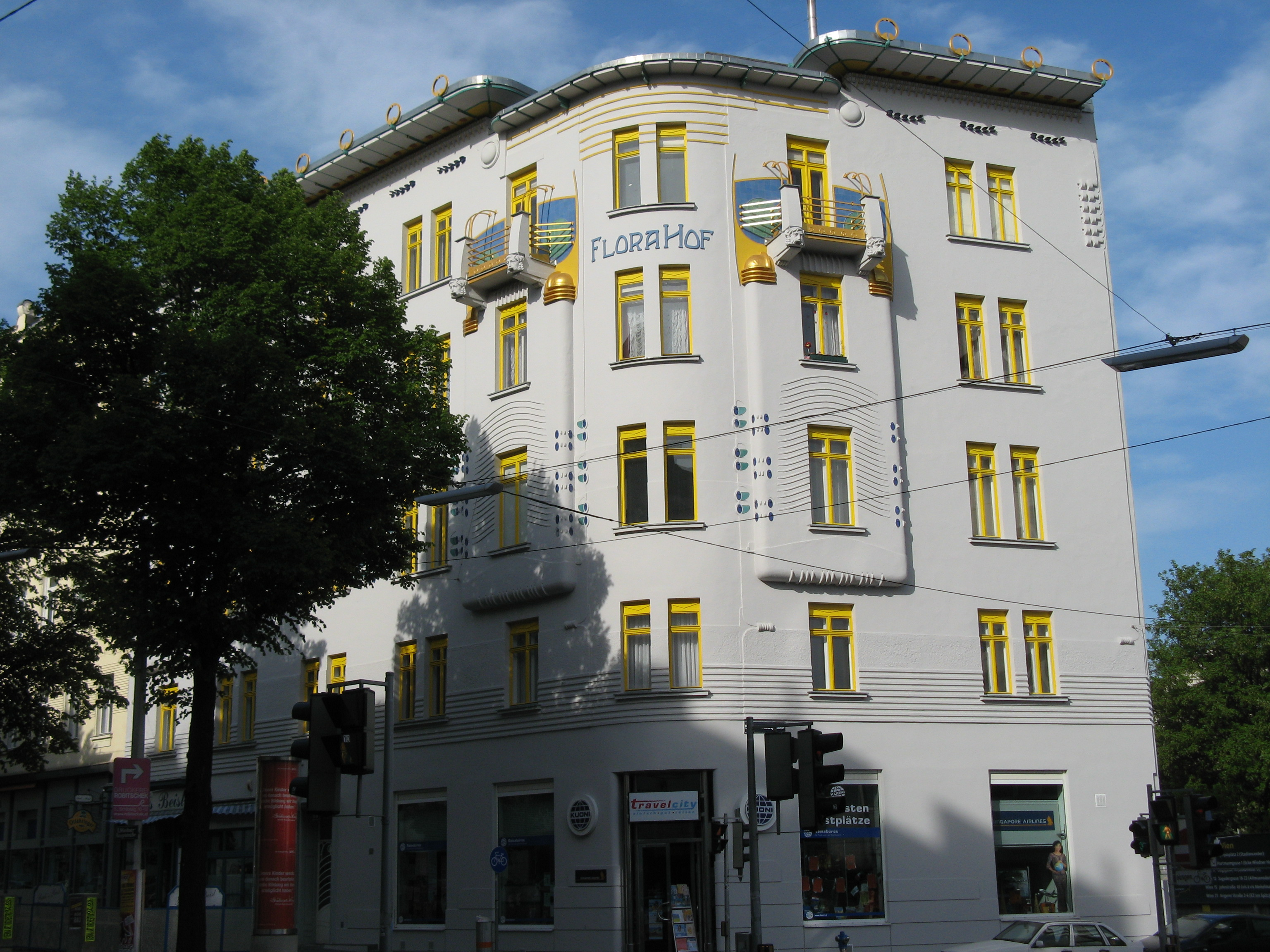 Flora-Hof (1901/02) von Wunibald Deininger, Wiedner Hauptstraße 88, Wien-Margareten